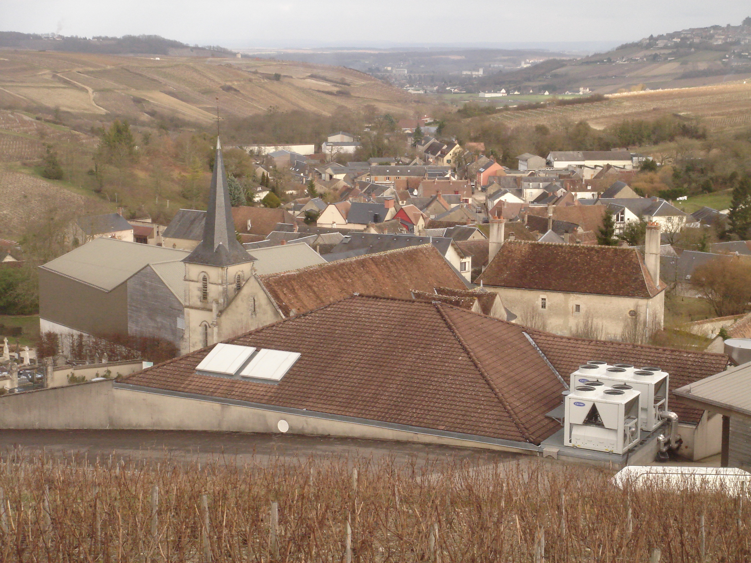 Ancienne commune de Chavignol, Sancerre, Cher, Centre, France